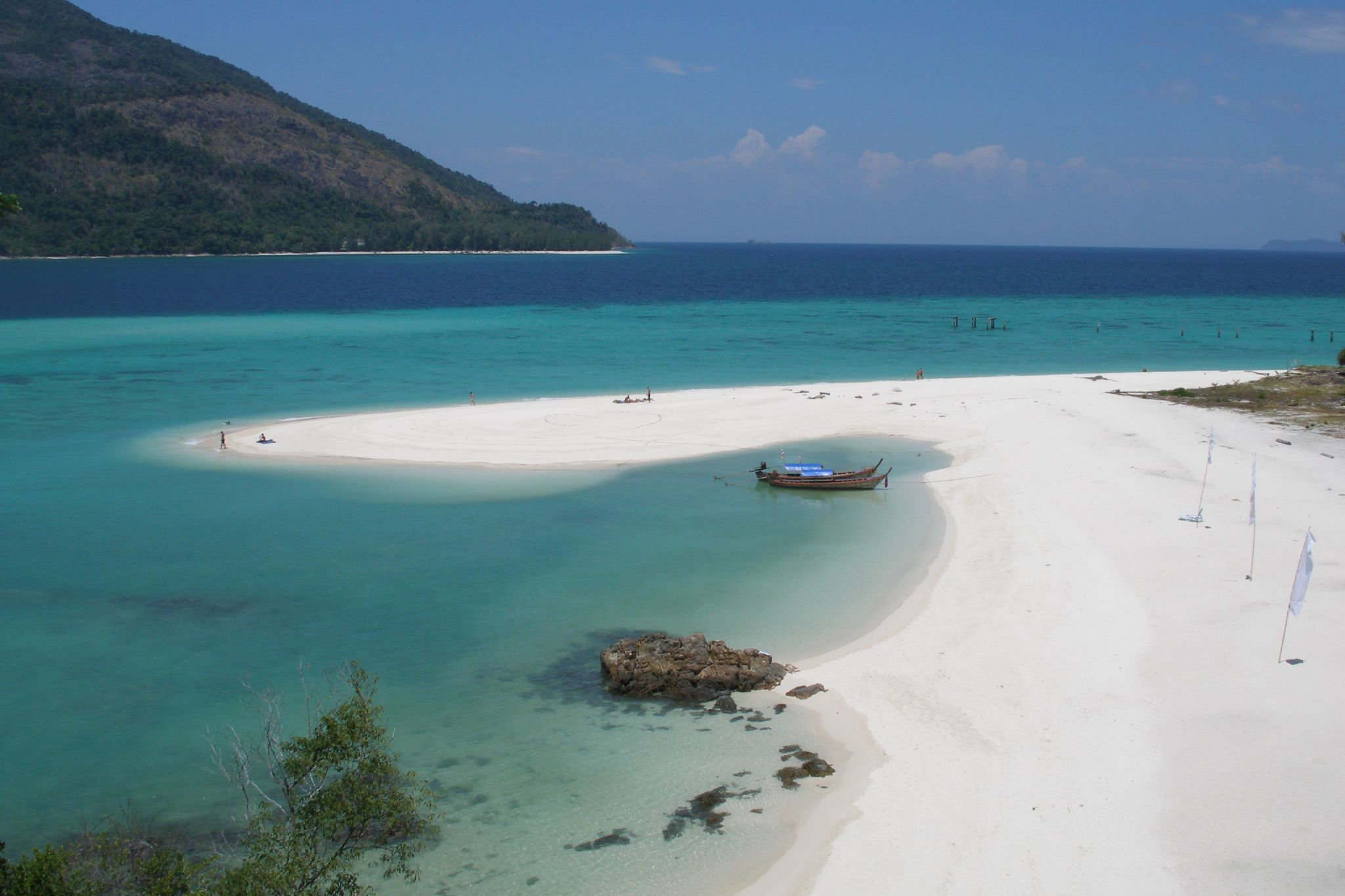 Ao Sunset, Koh Lipe